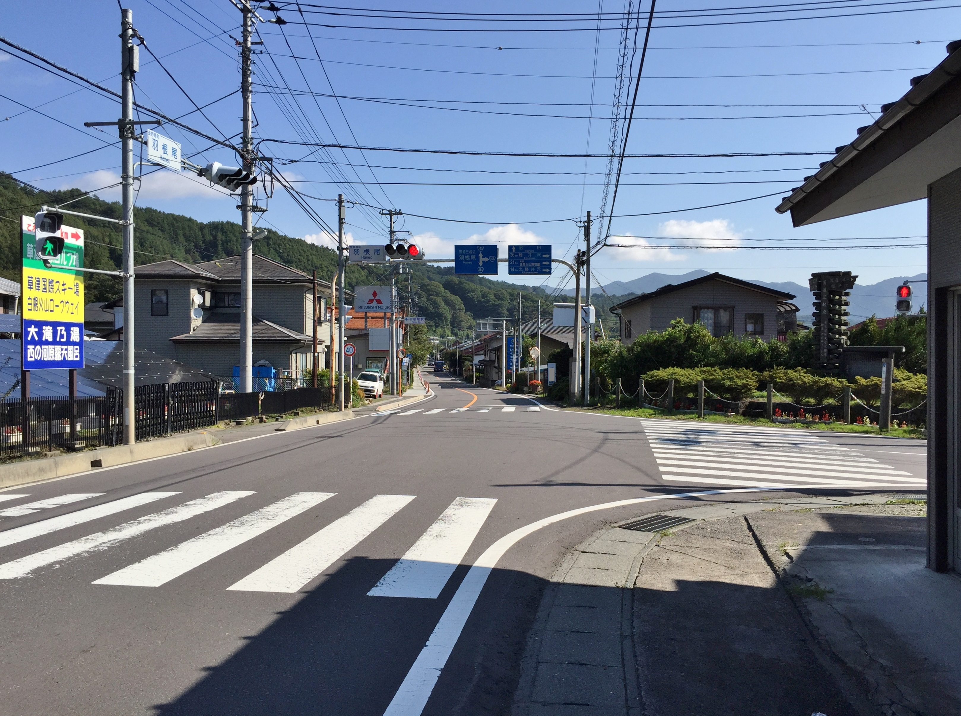 国道145号 羽根尾交差点